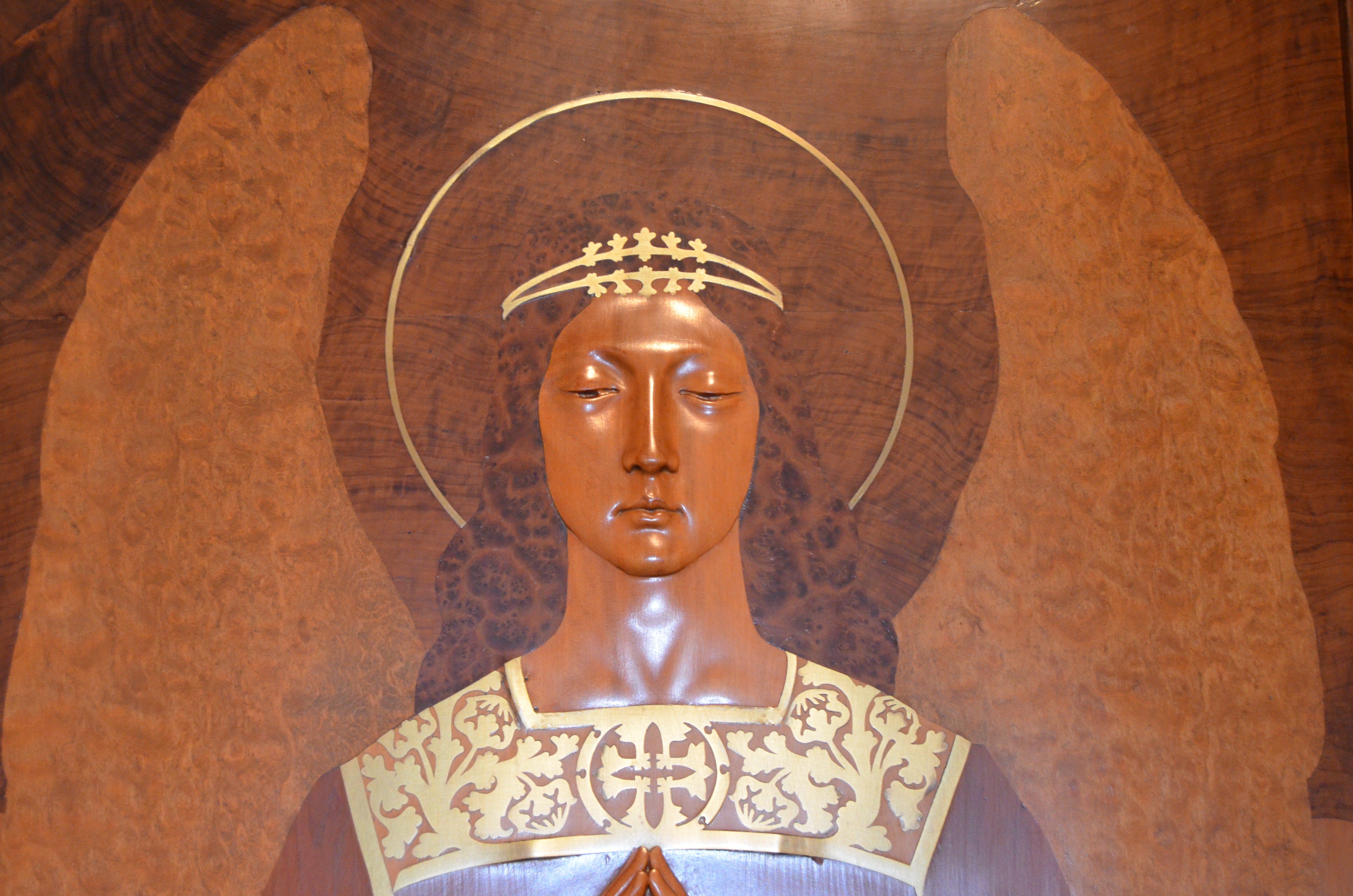 Detall de la talla i marqueteria del capçal de llit. Museu del Modernisme Català.